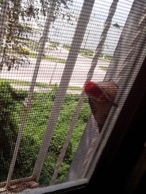 Carpintero Cabeza Roja en Poza Rica, Veracruz, México